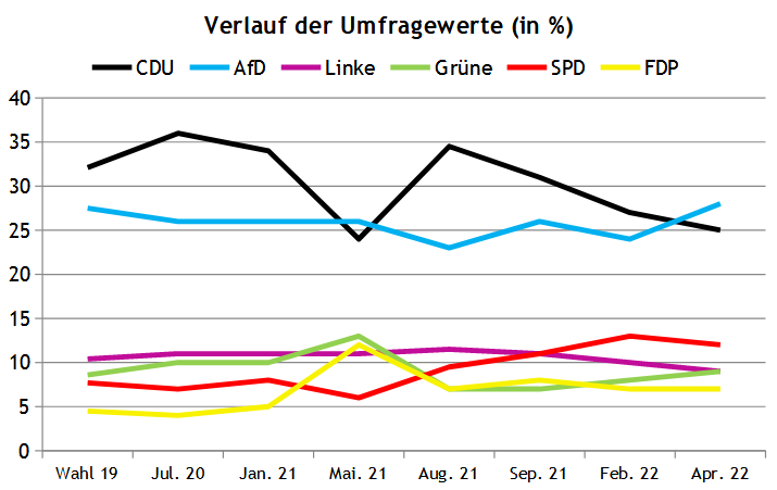 Umfragen zur achten Landtagswahl in Sachsen